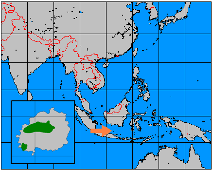 Bawean deer (Axis kuhlii) range map